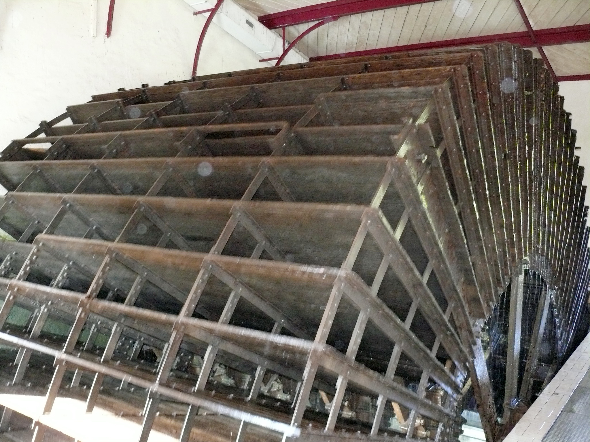 Roue hydrolique de Sagebien à l'usine élévatoire de Trilbardou. (département de la Seine-et-Marne, région Île-de-France).